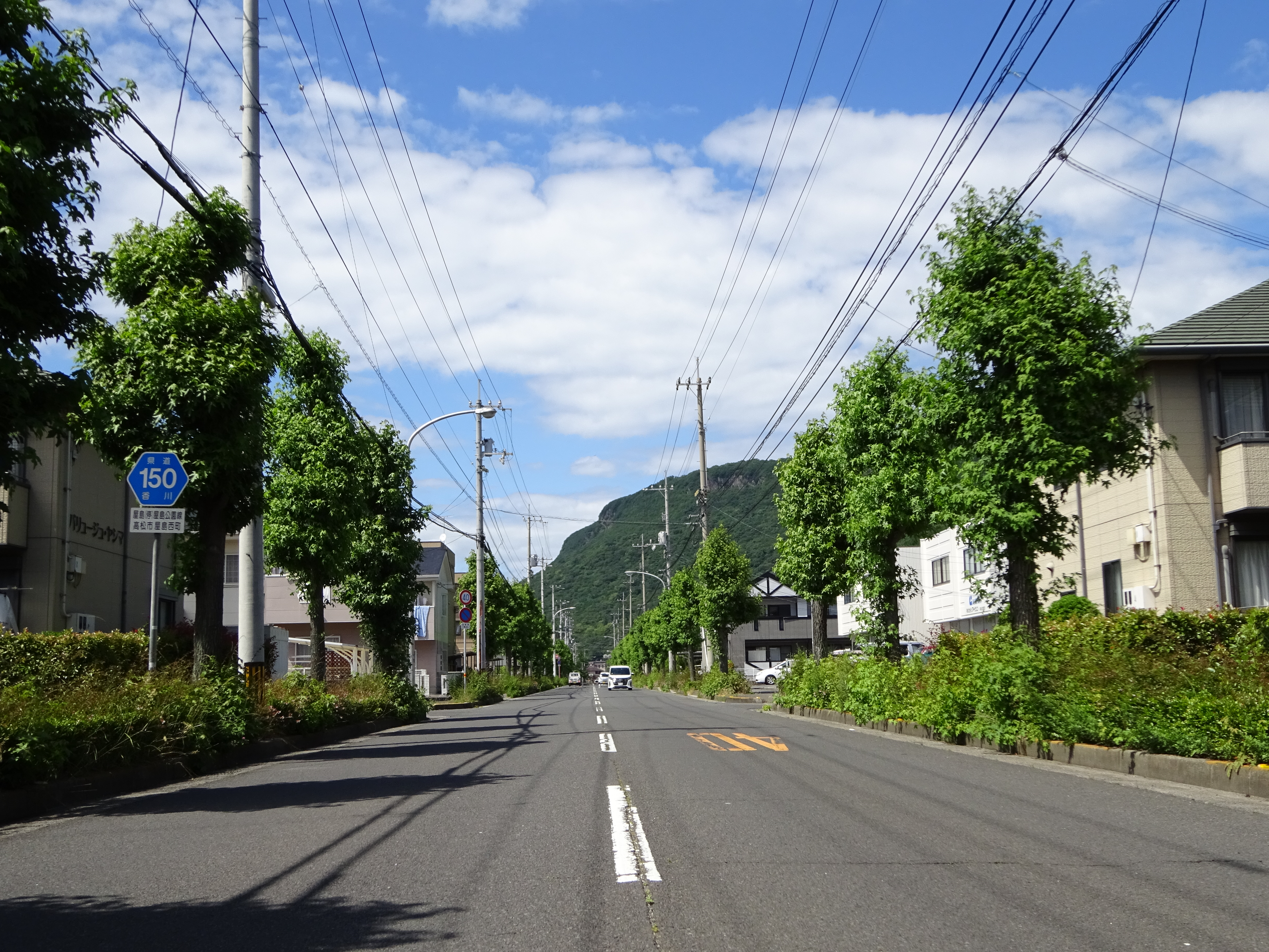 香川県道Ｒ１５０号で第一健康ランド・浦生（うろ）方面を臨む